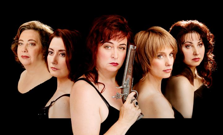 Pressefoto Lizzy und die weissen Lilien